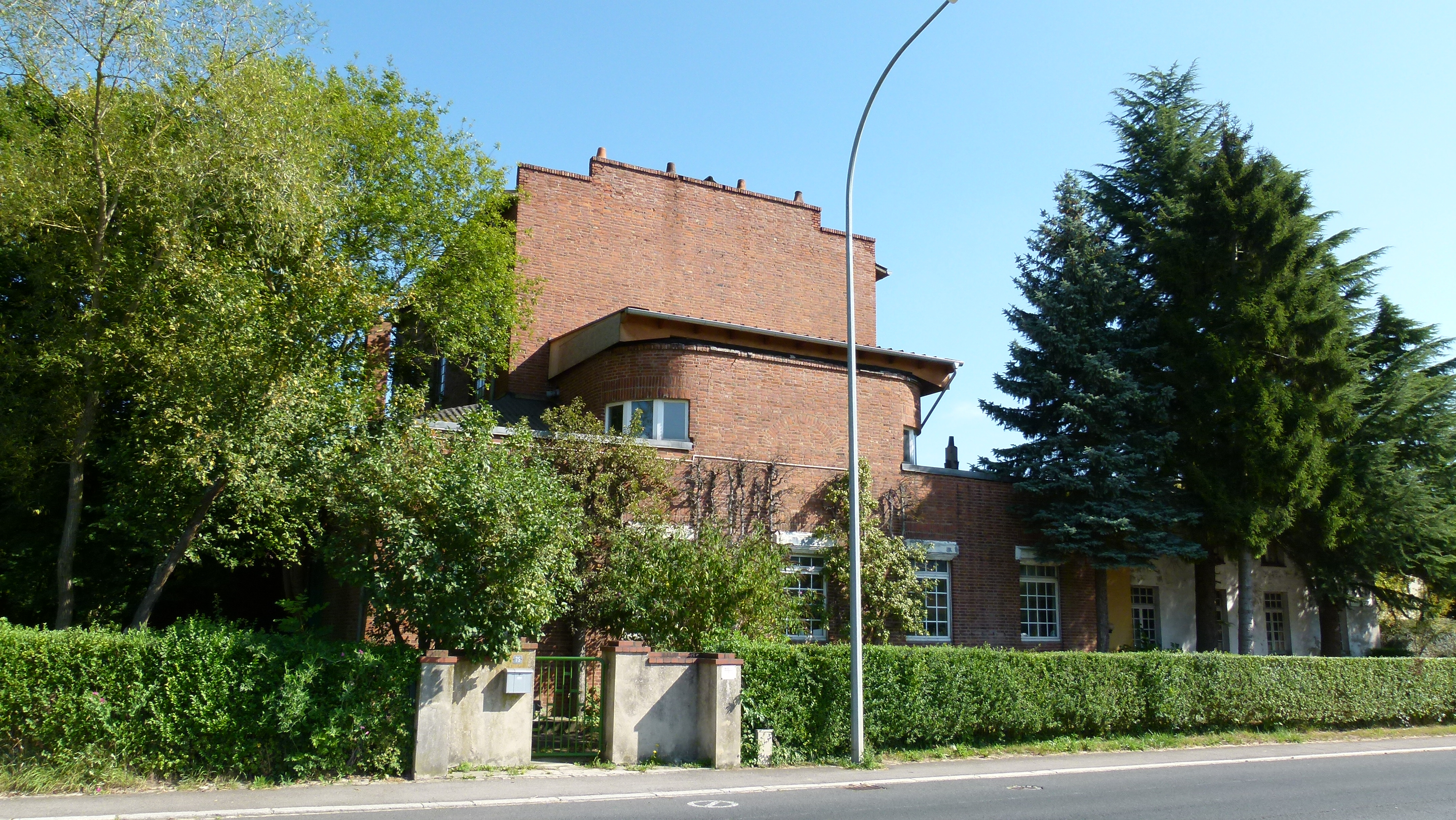 Uergelfabrik Lëntgen vun lénks